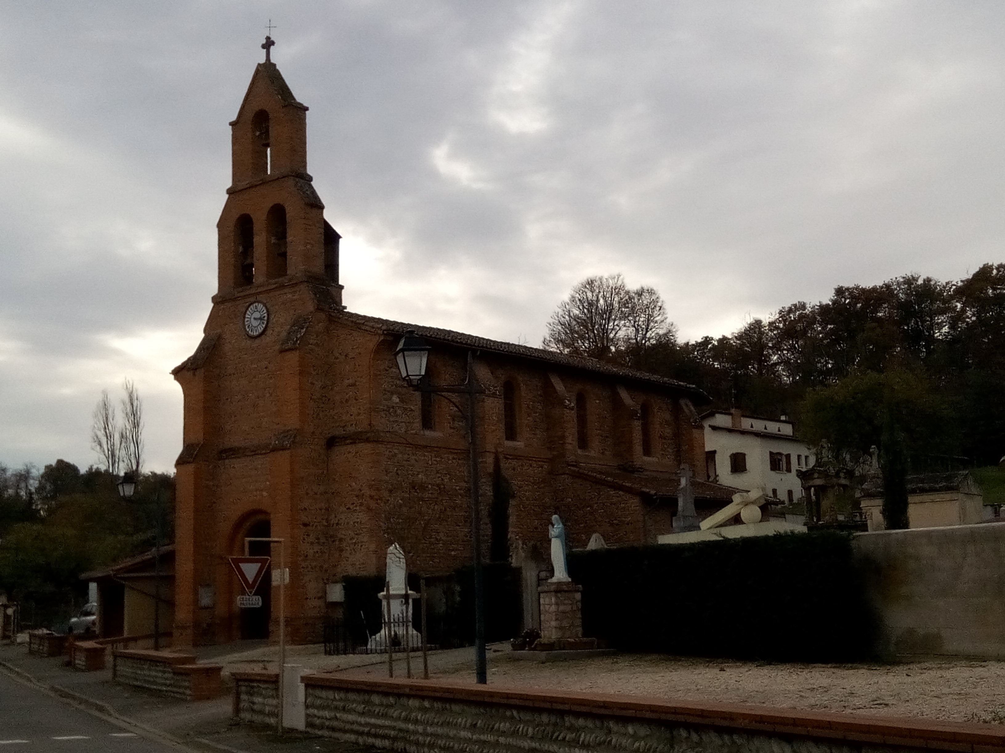 Église du Bois-de-la-Pierre